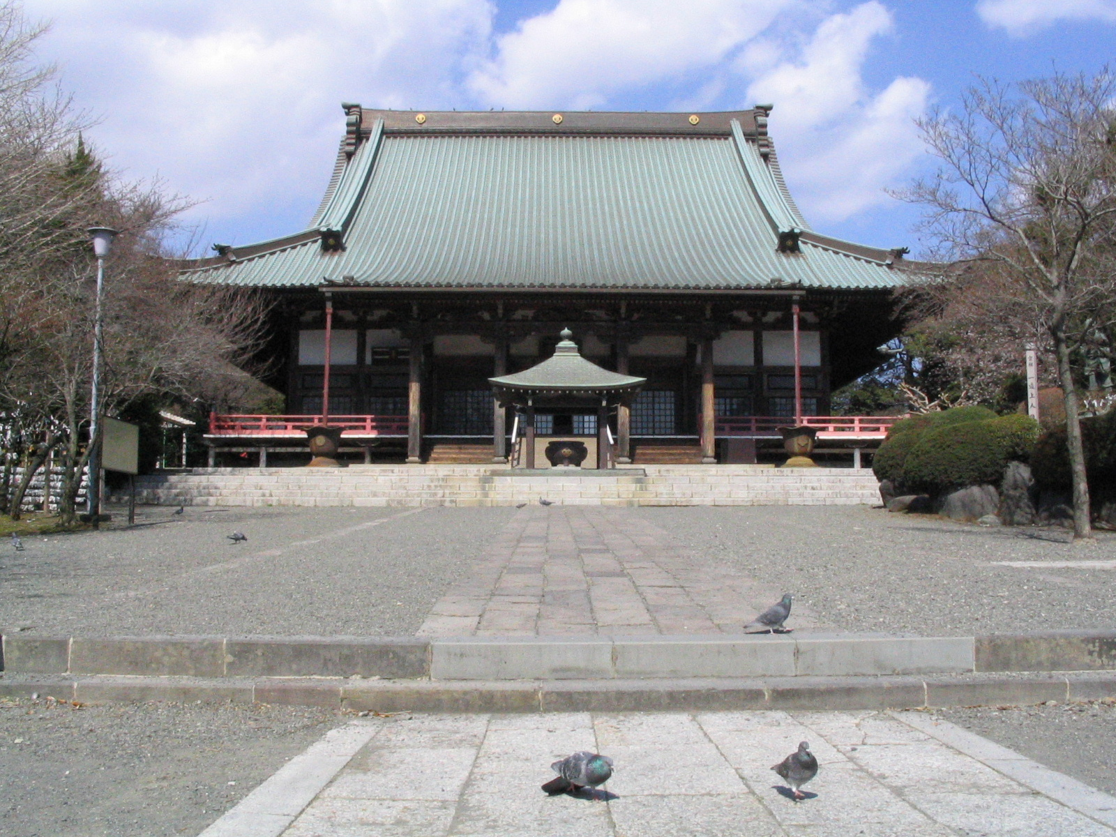 撮影者自身による投稿。 神奈川県藤沢市の遊行寺、2006年3月25日撮影。Shōjōkōji Hondō, Fujisawa, Kanagawa, Japan